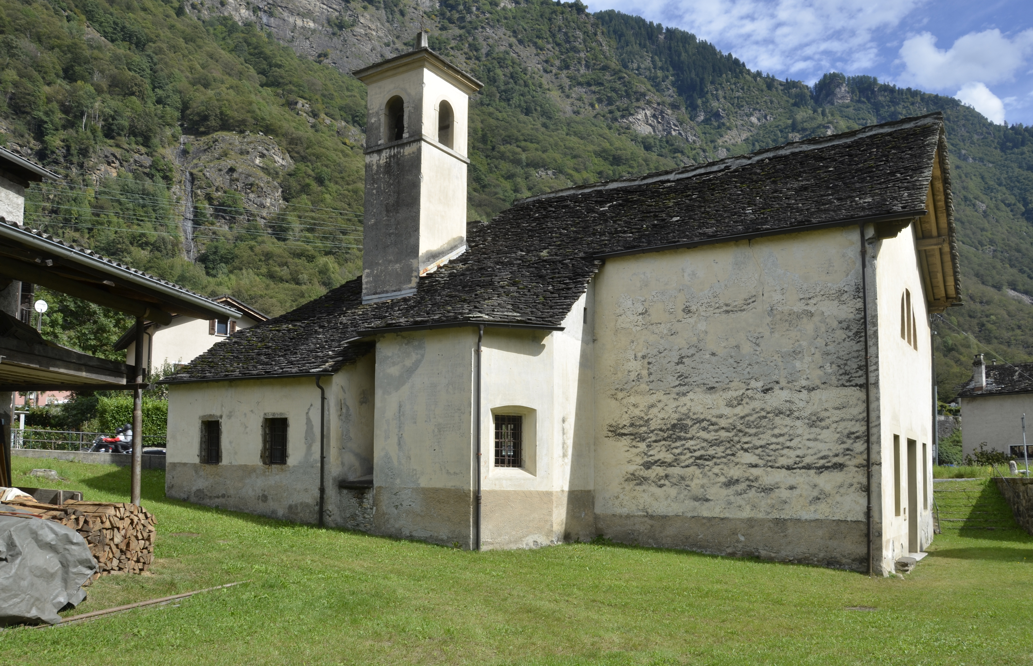 Oratorio di Santa Maria Nascente